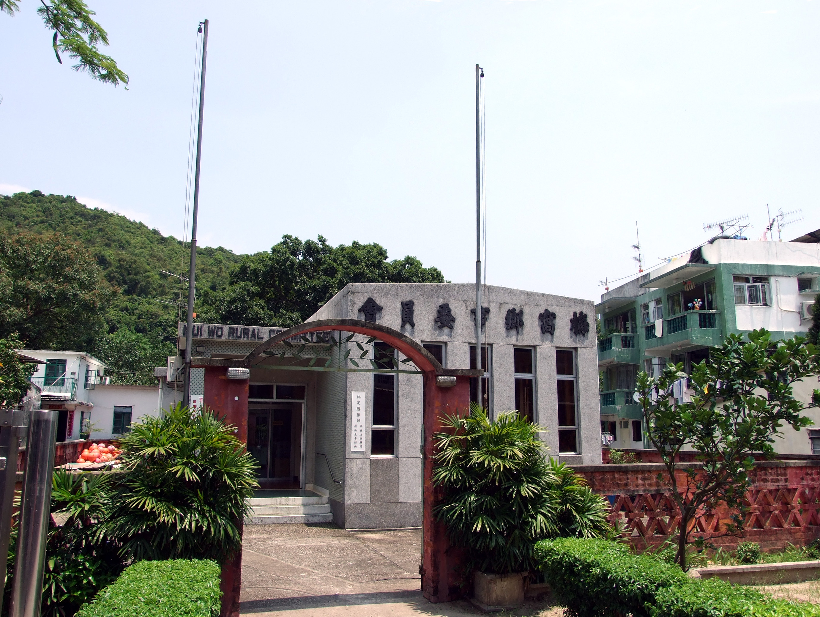 中文（香港）: 梅窩鄉事委員會